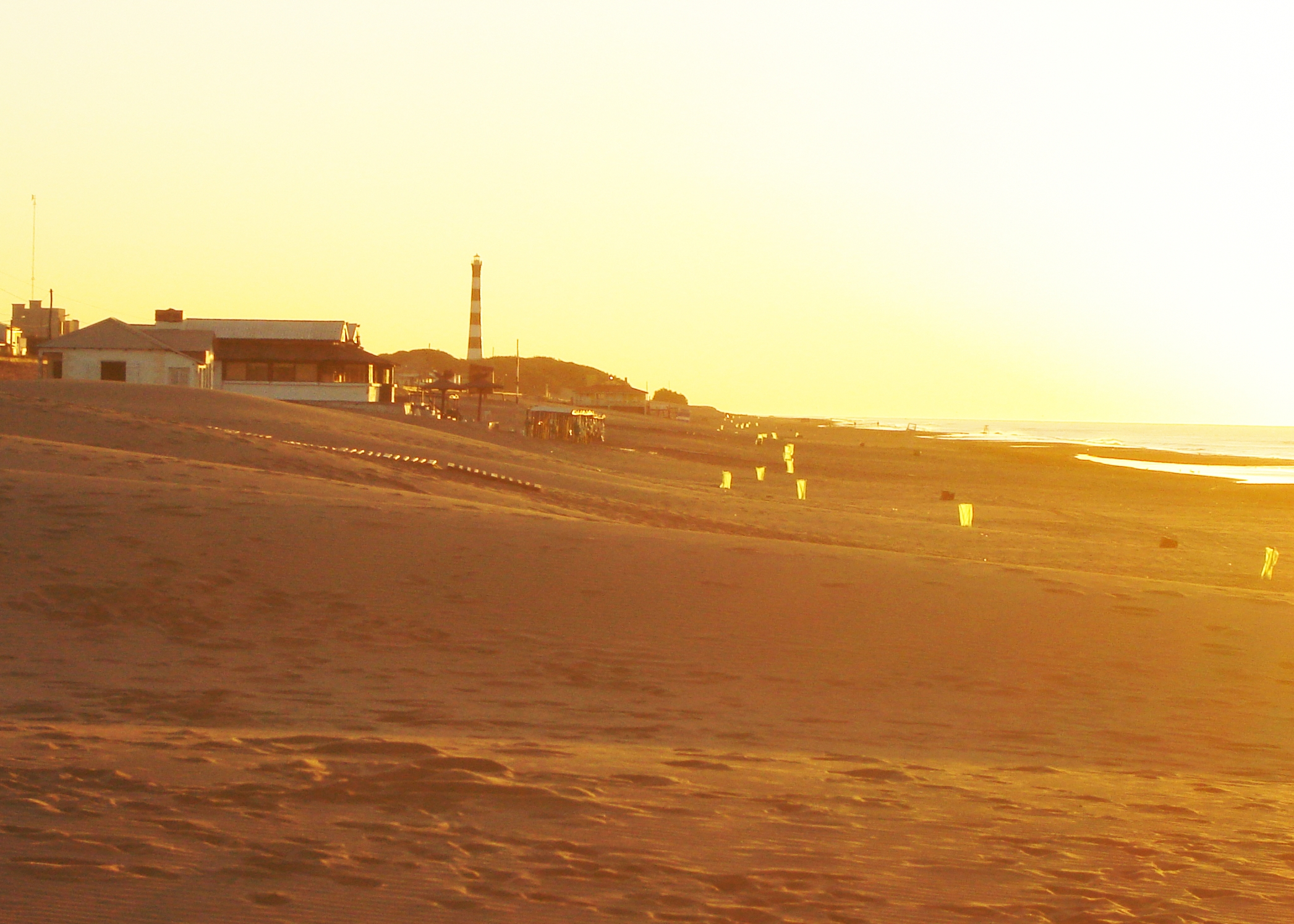 Amanecer en Claromecó